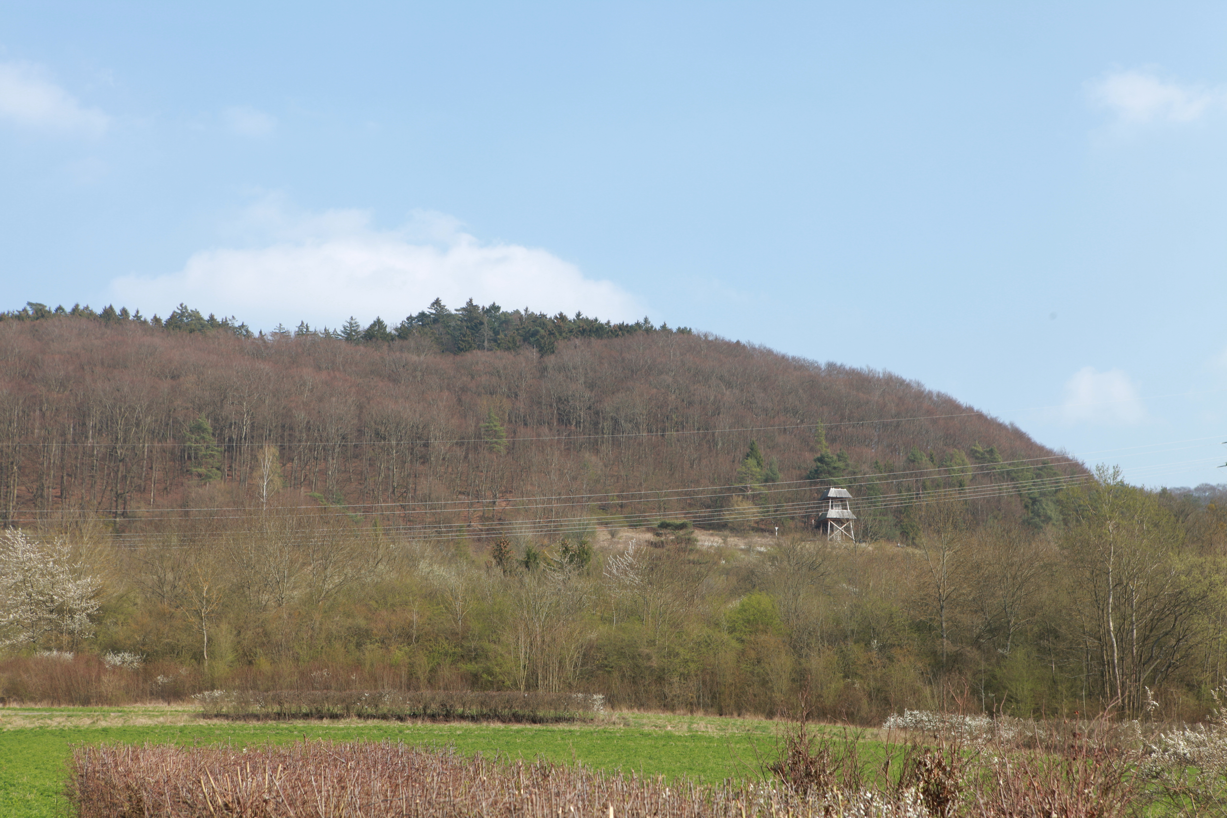 Foto des Sonnebierg in Helmsange (Walferdange)